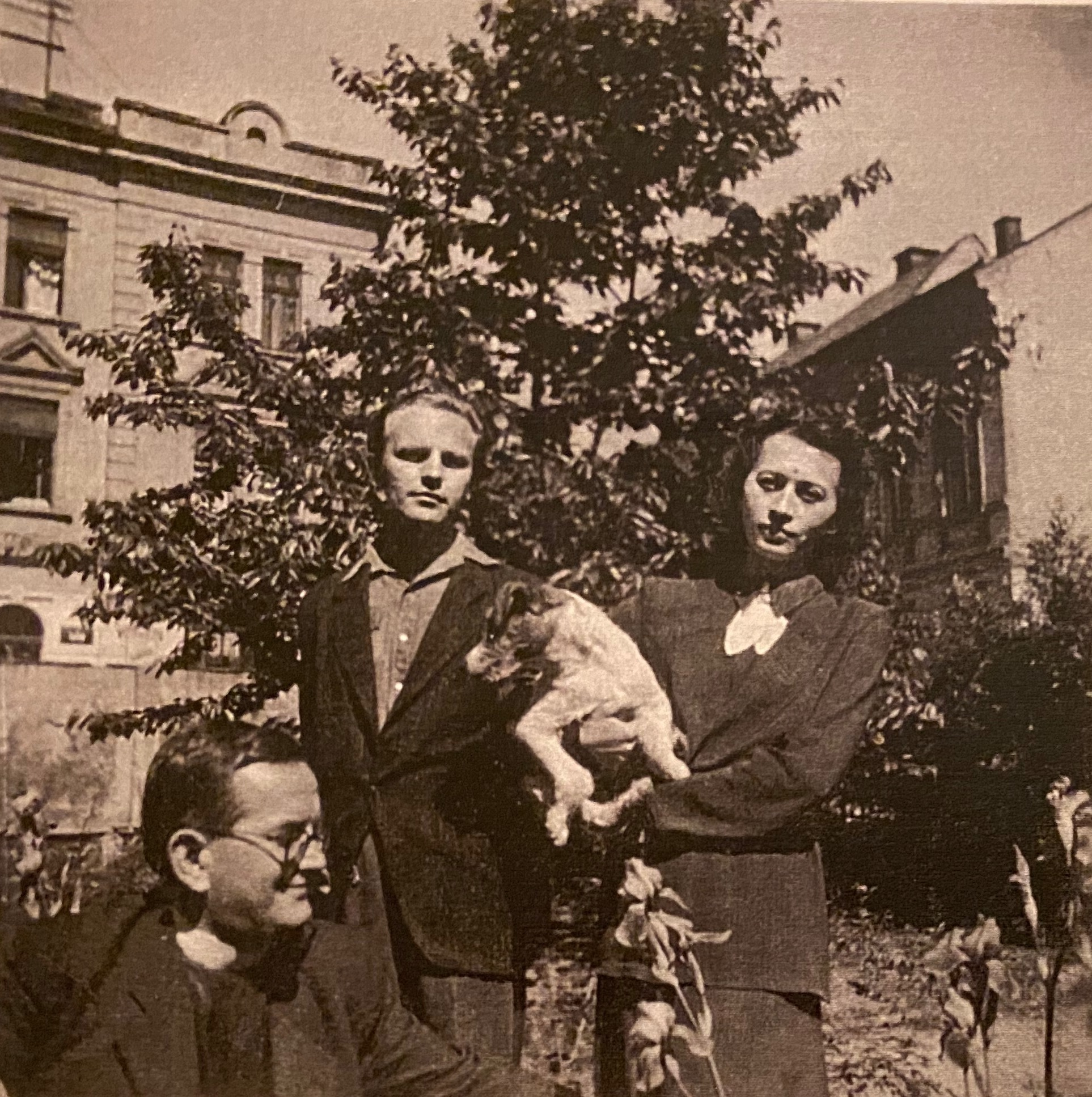 P. Vojtěch Bartoš SJ s přáteli na zahradě fary v Křížové 25 v Děčíně, cca v roce 1950